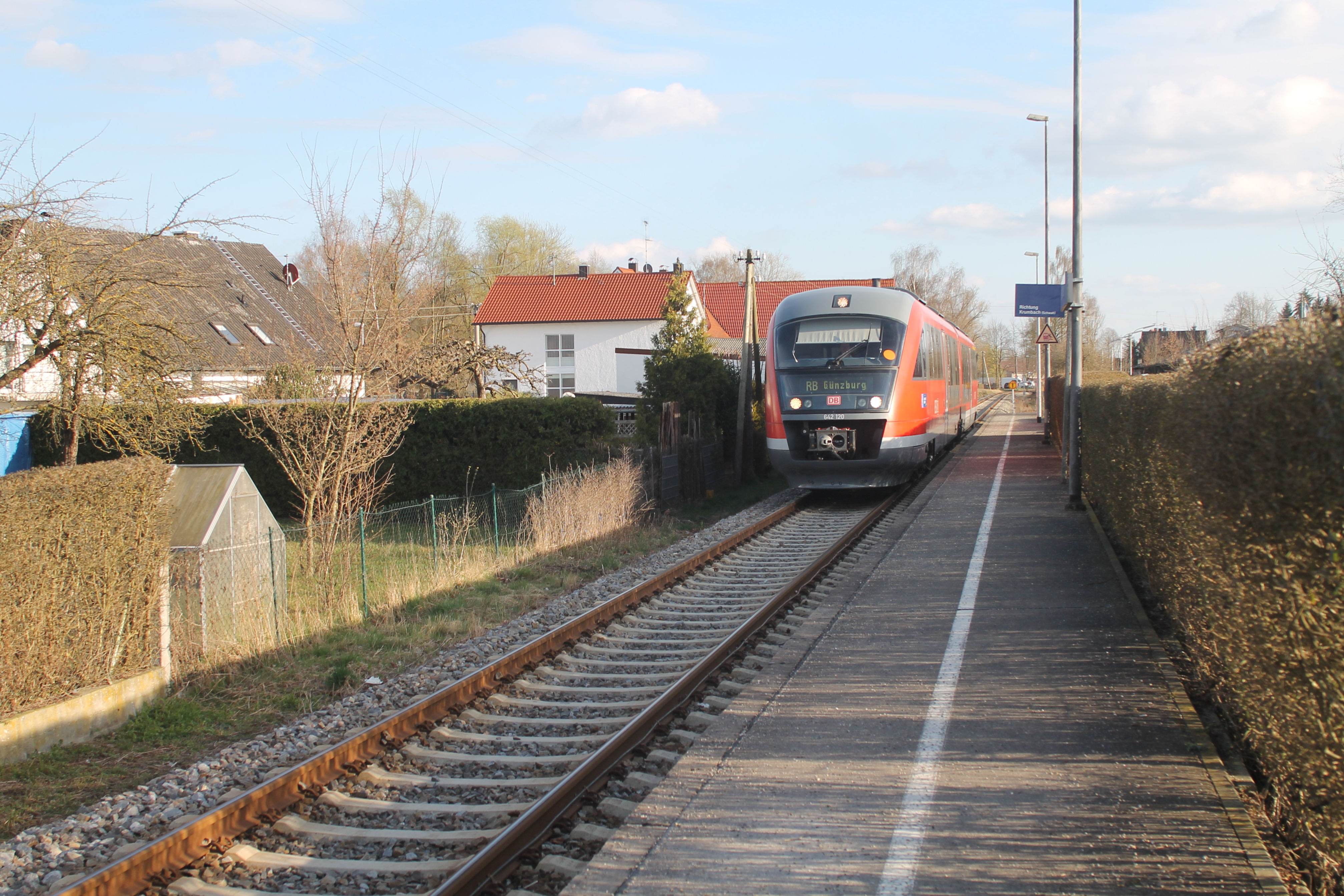 Einfahrender Zug im Bahnhof Wasserburg